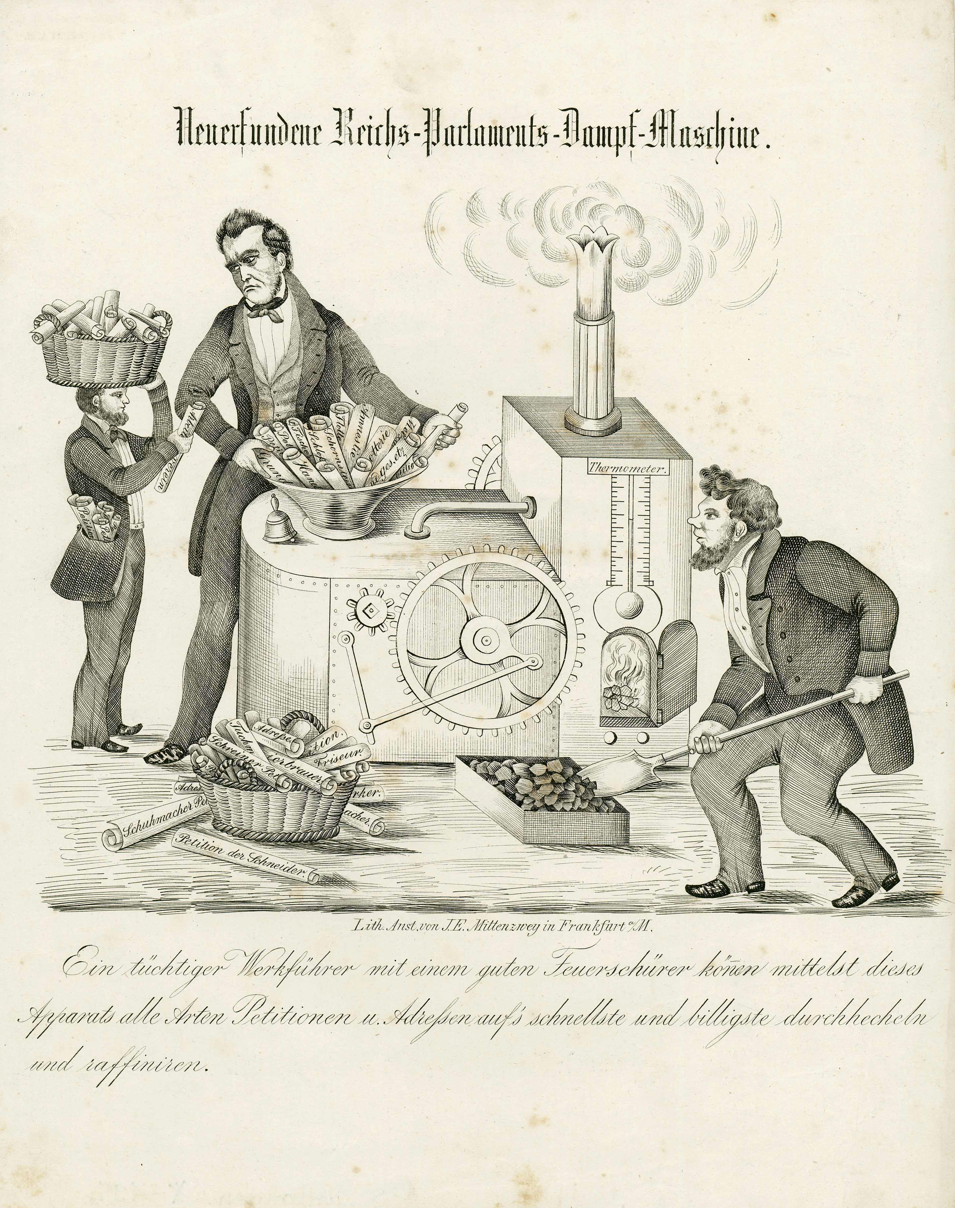 „Reichs-Parlaments-Dampf-Maschine", Lithographische Anstalt J. A. Mittenzweig, Frankfurt, 1848 (GLAK J-S Karikaturen Nr. 191)